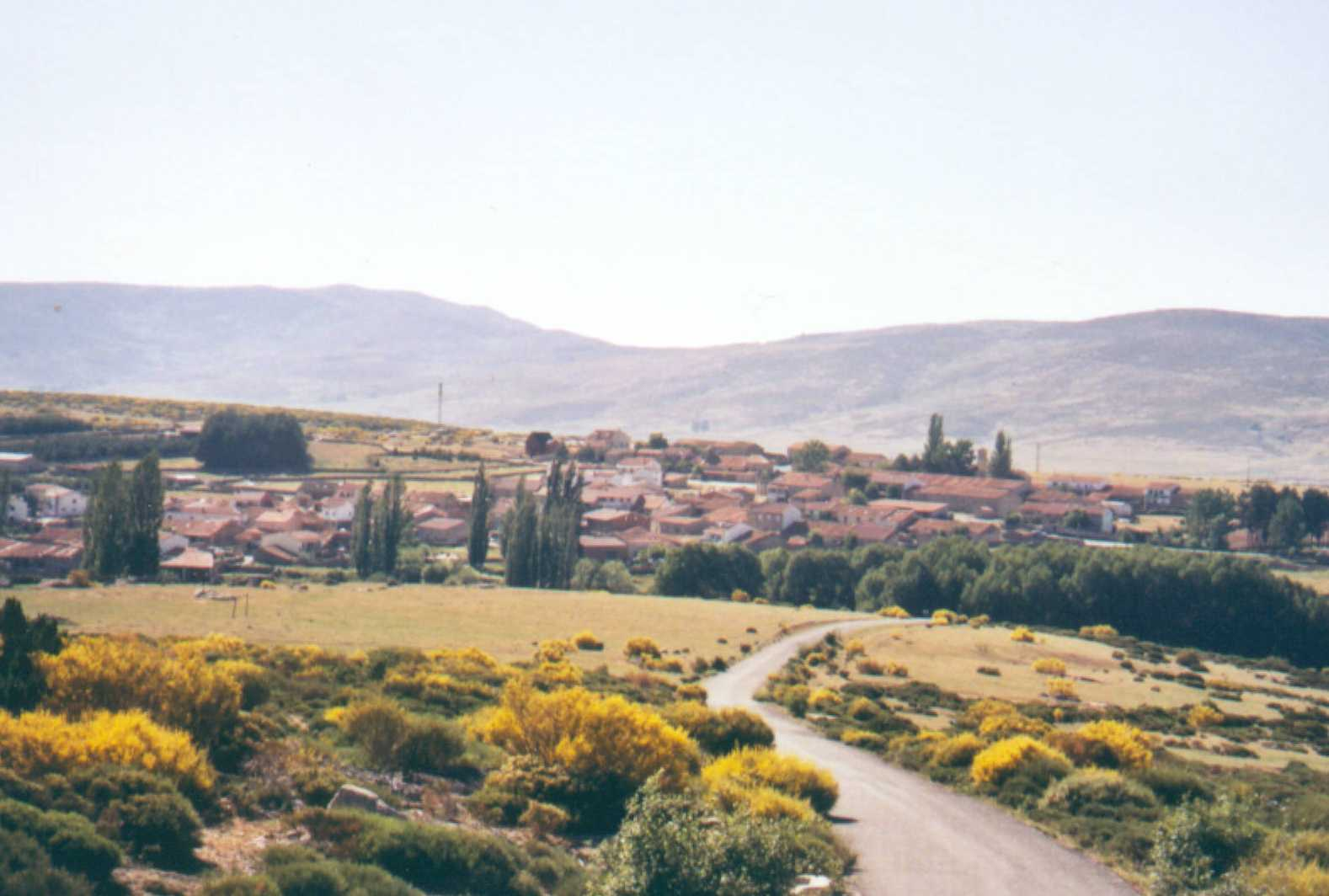 NAVADIJOS (ÁVILA; ESPAÑA)